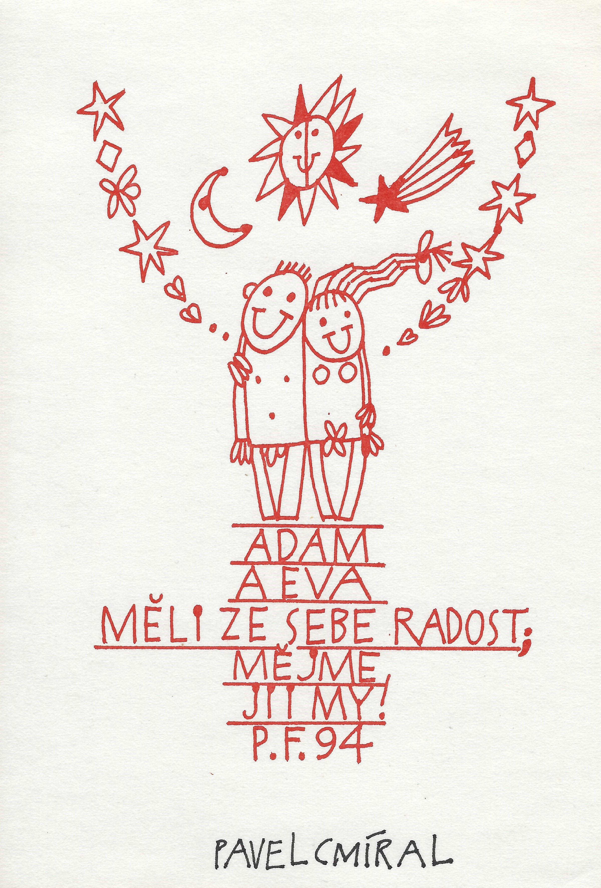 Kresba - novoročenka 1994